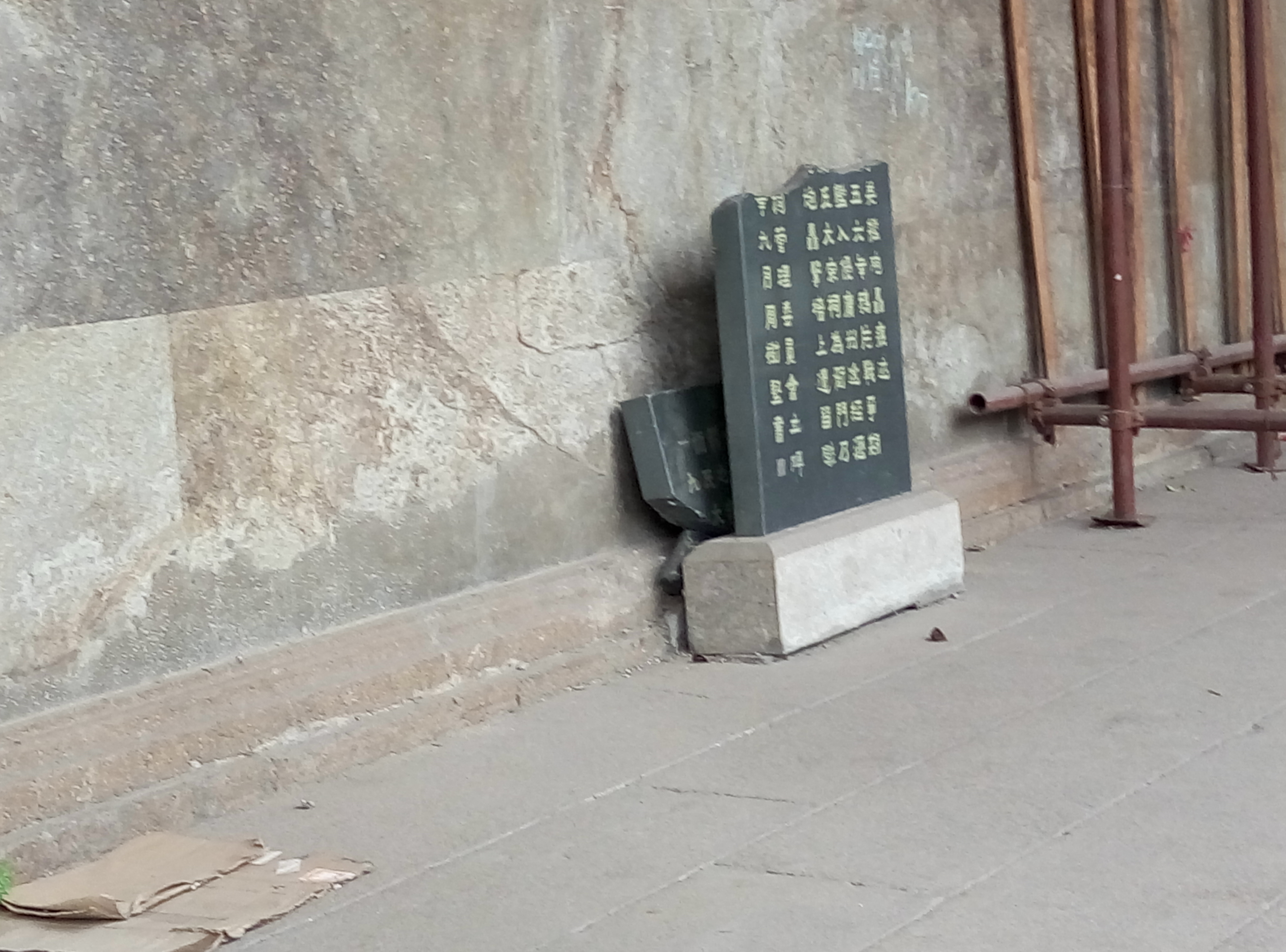 粵語: 廣州瀝滘 慶源堂 斷碑